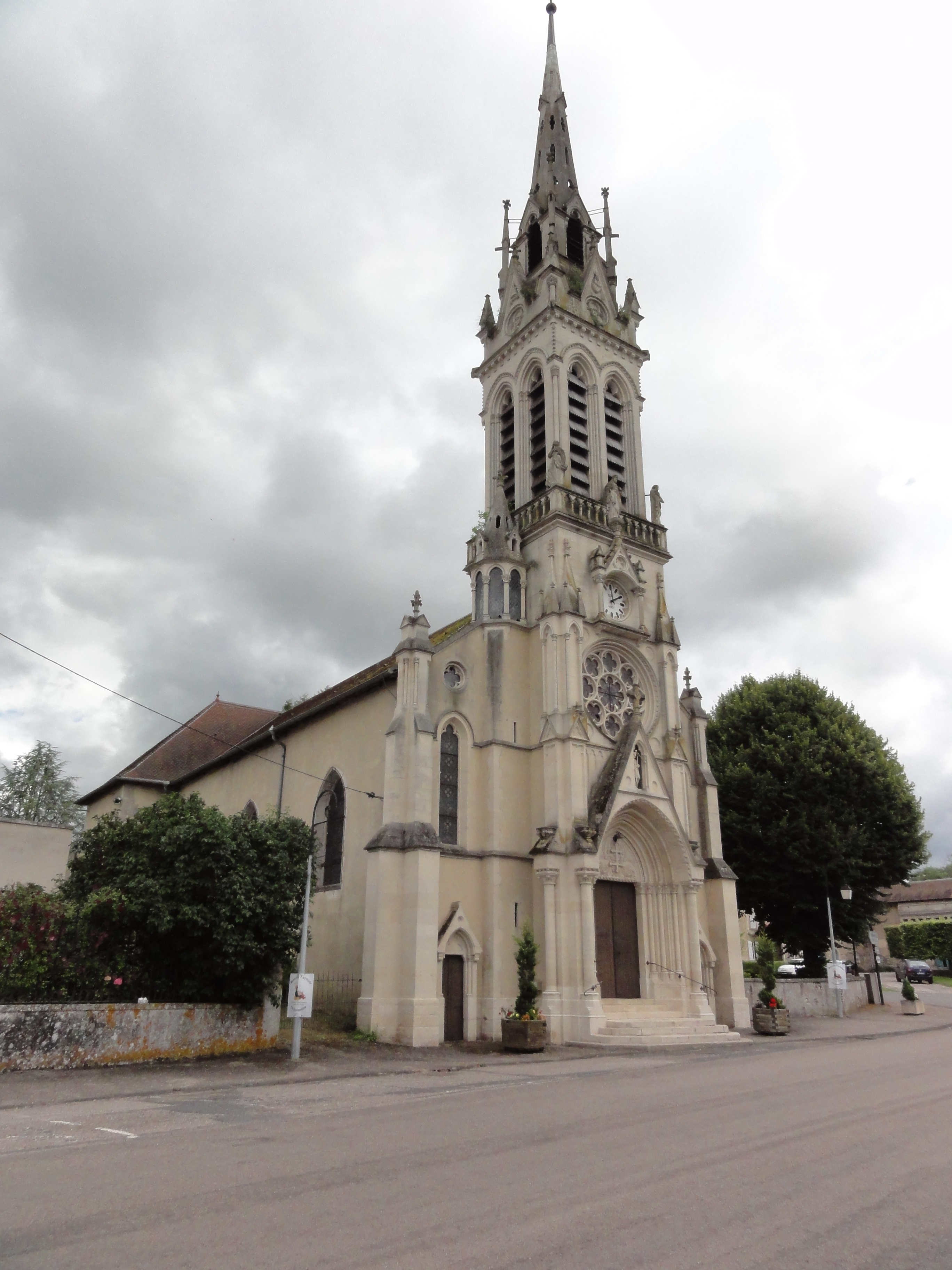 Haroué (M-et-M) église